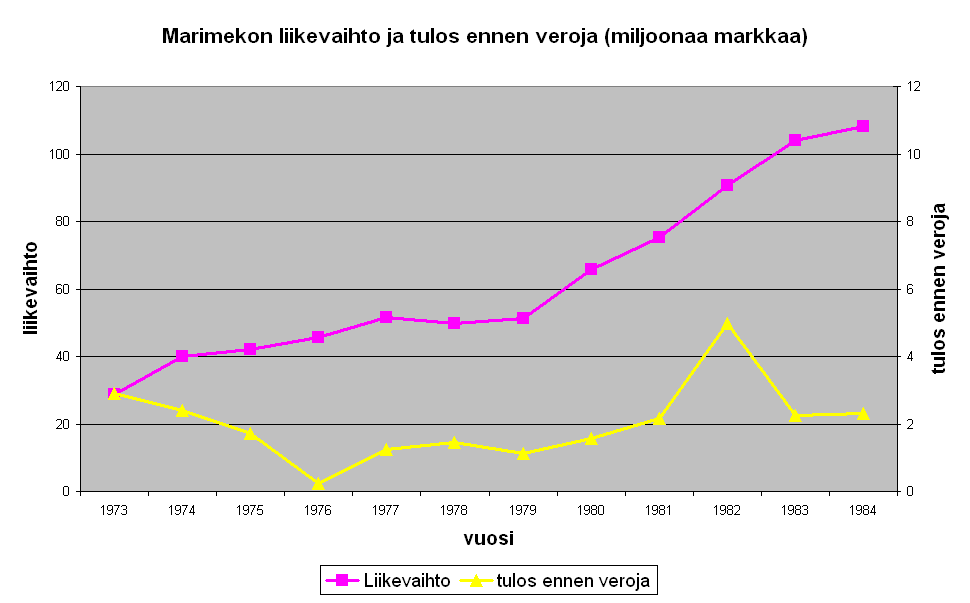 Marimekko Oy:n liikevaihto ja tulos ennen veroja 1973-1984. Lähde: Vuosikertomukset.